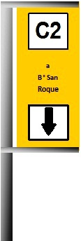 Modelo de parada de colectivos en la ciudad.